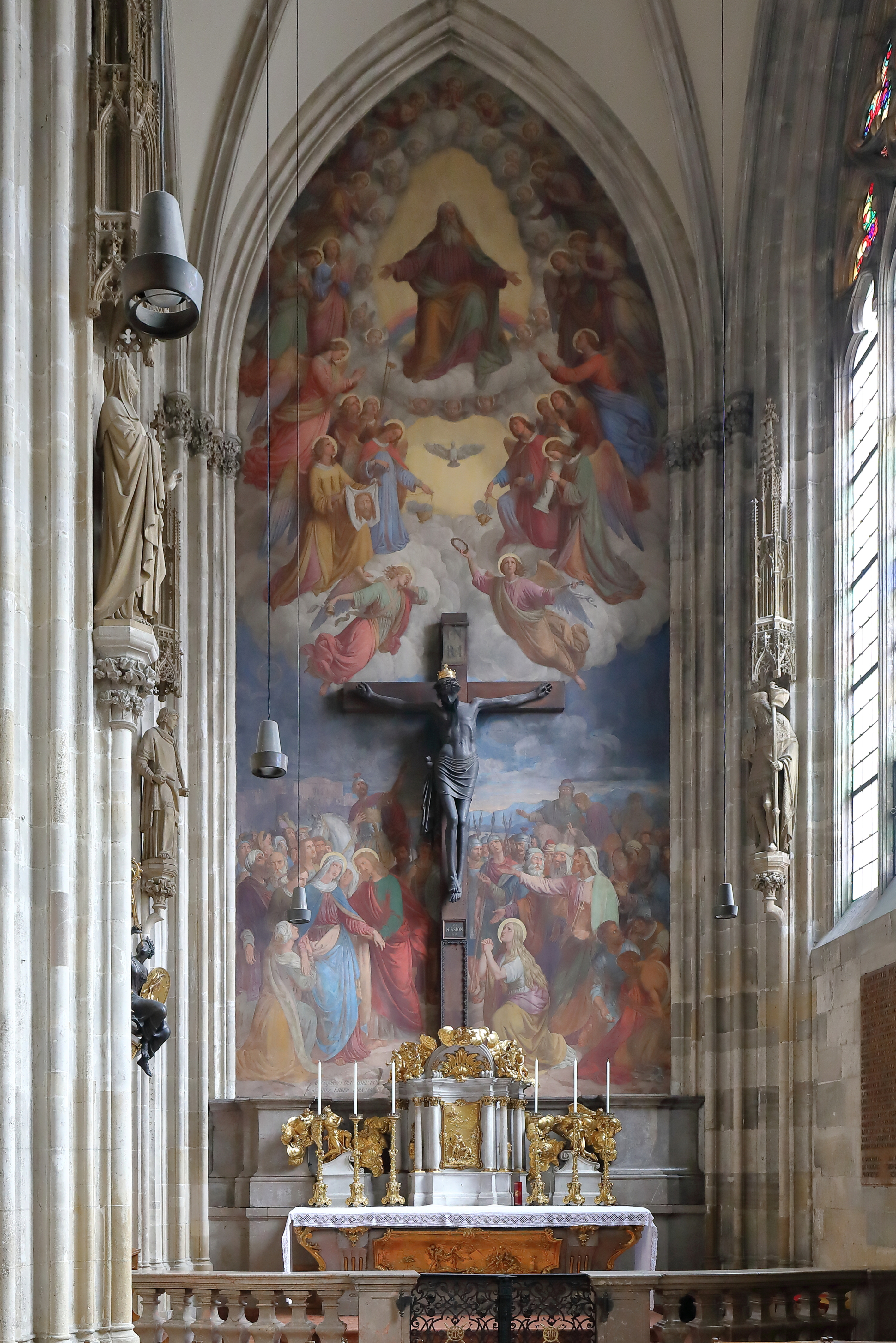 Die Kreuz- bzw. Prinz-Eugen-Kapelle im Stephansdom in der österreichischen Bundeshauptstadt Wien.Die Kapelle wurde von den Herren von Tirna, eine ritterliche Wiener Bürgerfamilie, gestiftet und zwischen 1358 und 1362 an der Nordwestecke des Domes errichtet. Wegen dem großen holzgeschnitzten Kruzifix, das man vor 1685 hier anbrachte, erhielt die Kapelle den Namen Kreuzkapelle. In der Gruft der Kapelle ist Prinz Eugen von Savoyen († 1736) und Emanuel Thomas von Savoyen († 1729), ein Neffe Prinz Eugens, beigesetzt. Ab 1852 wurde die Kreuzkapelle umgestaltet. Unter anderem erhielt dabei in Ergänzung zu dem spätgotischen Kruzifix die Altarwand ein Fresko, das die Ereignisse auf Golgotha darstellt und das Johann Ender 1853 malte.